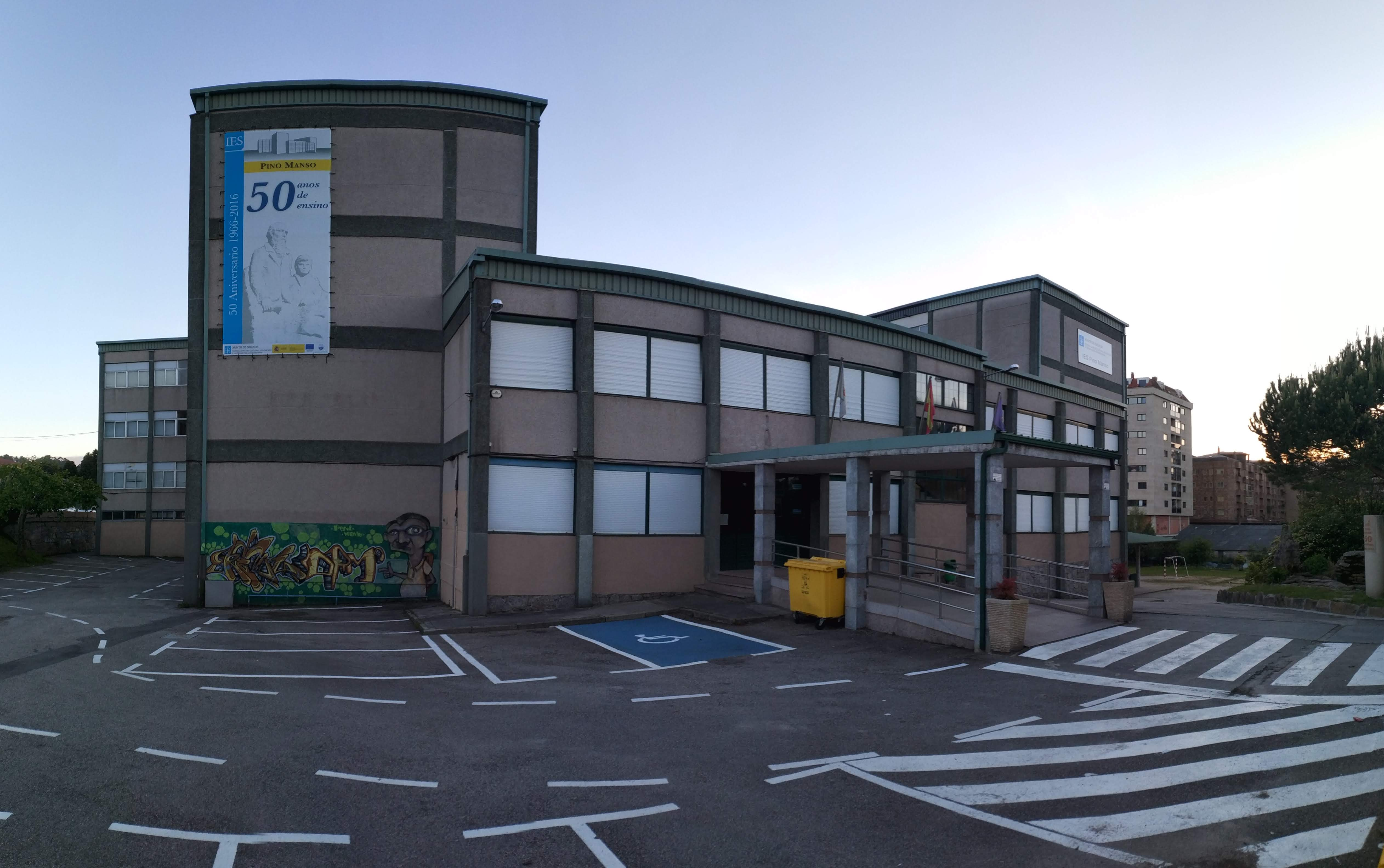 Instituto do Porriño